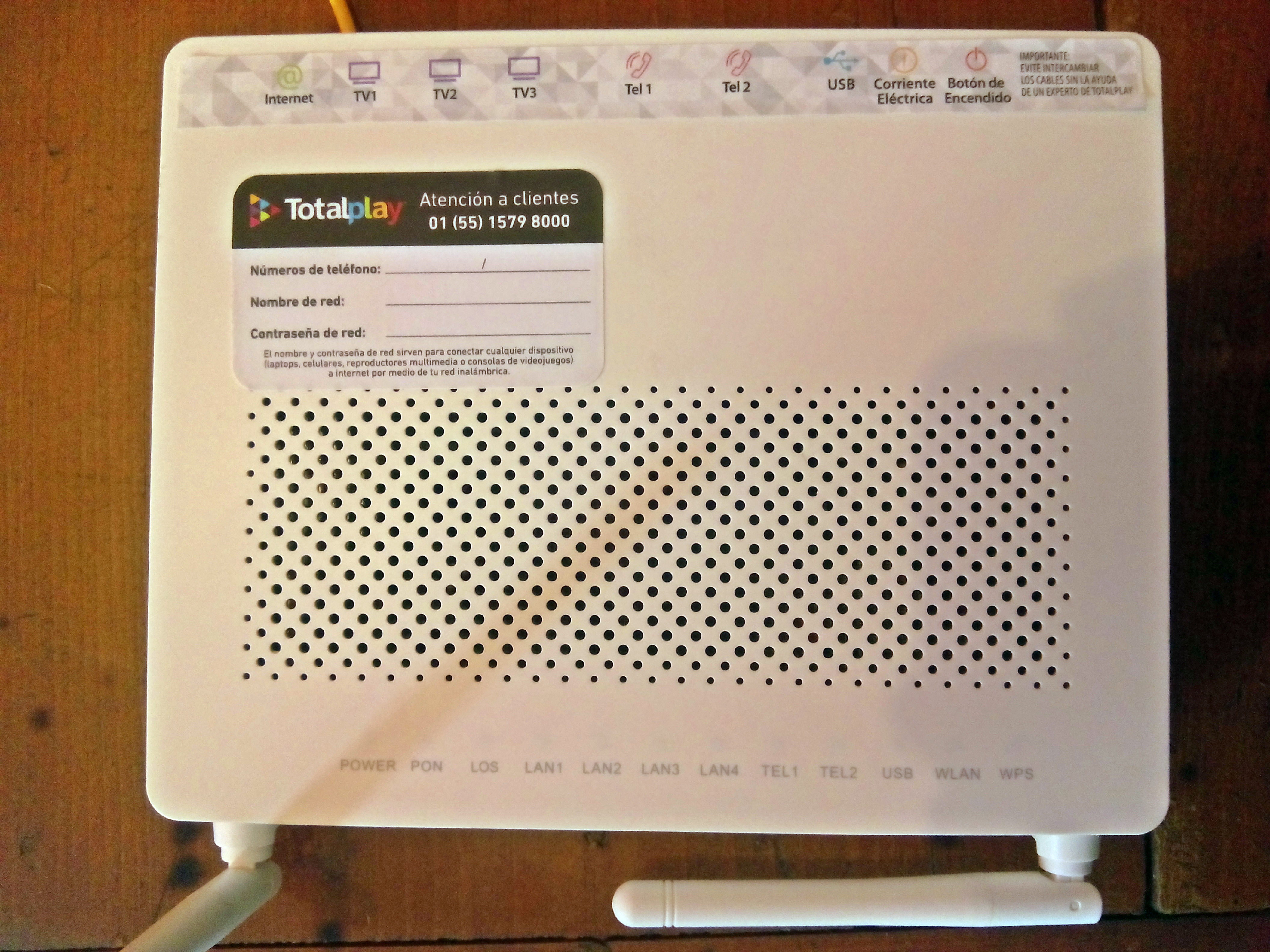 Módem que ofrece totalplay México al momento de contratar sus servicios.